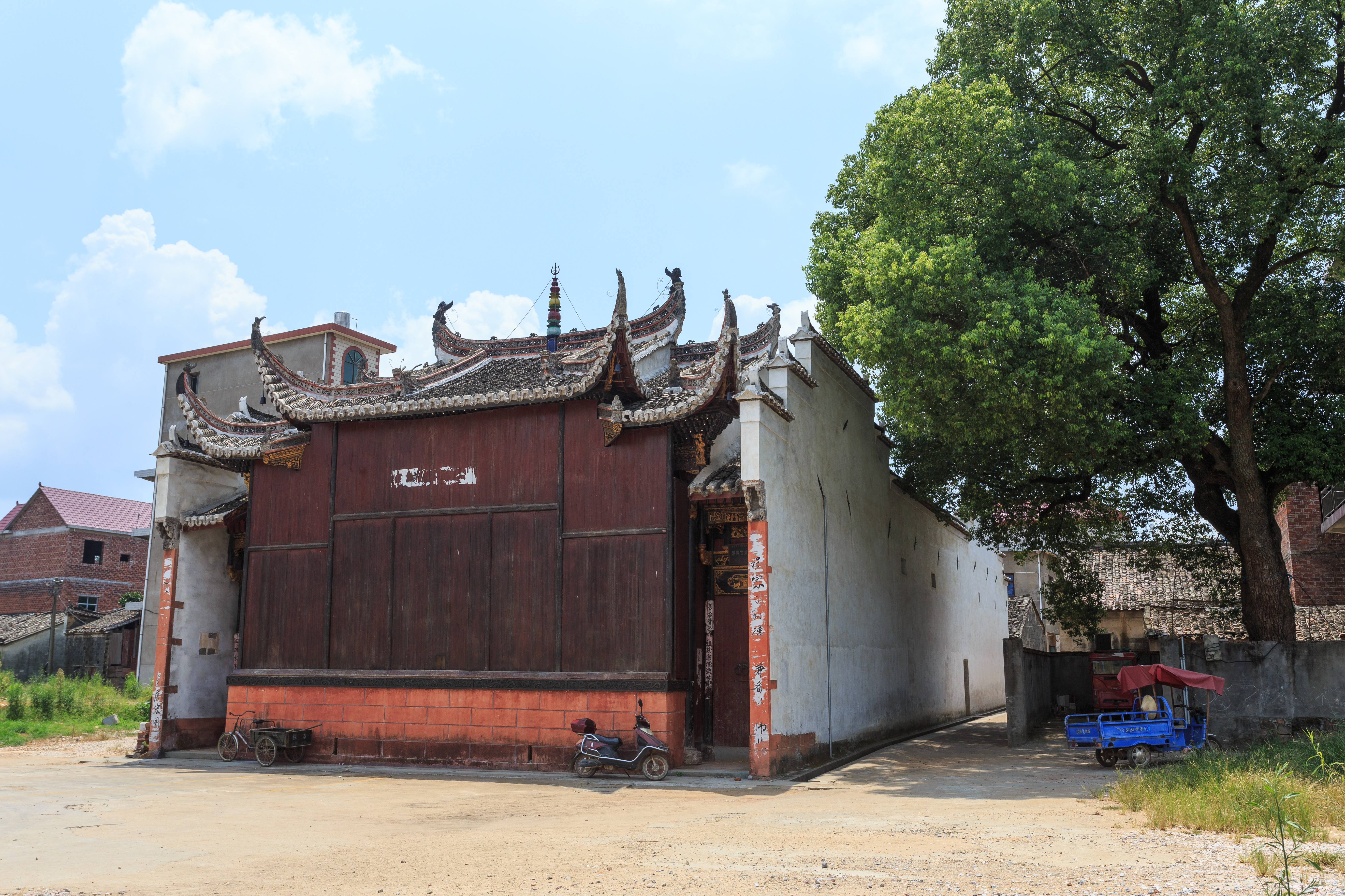 名分堂戏台，位于中国江西省乐平市镇桥镇浒崦村